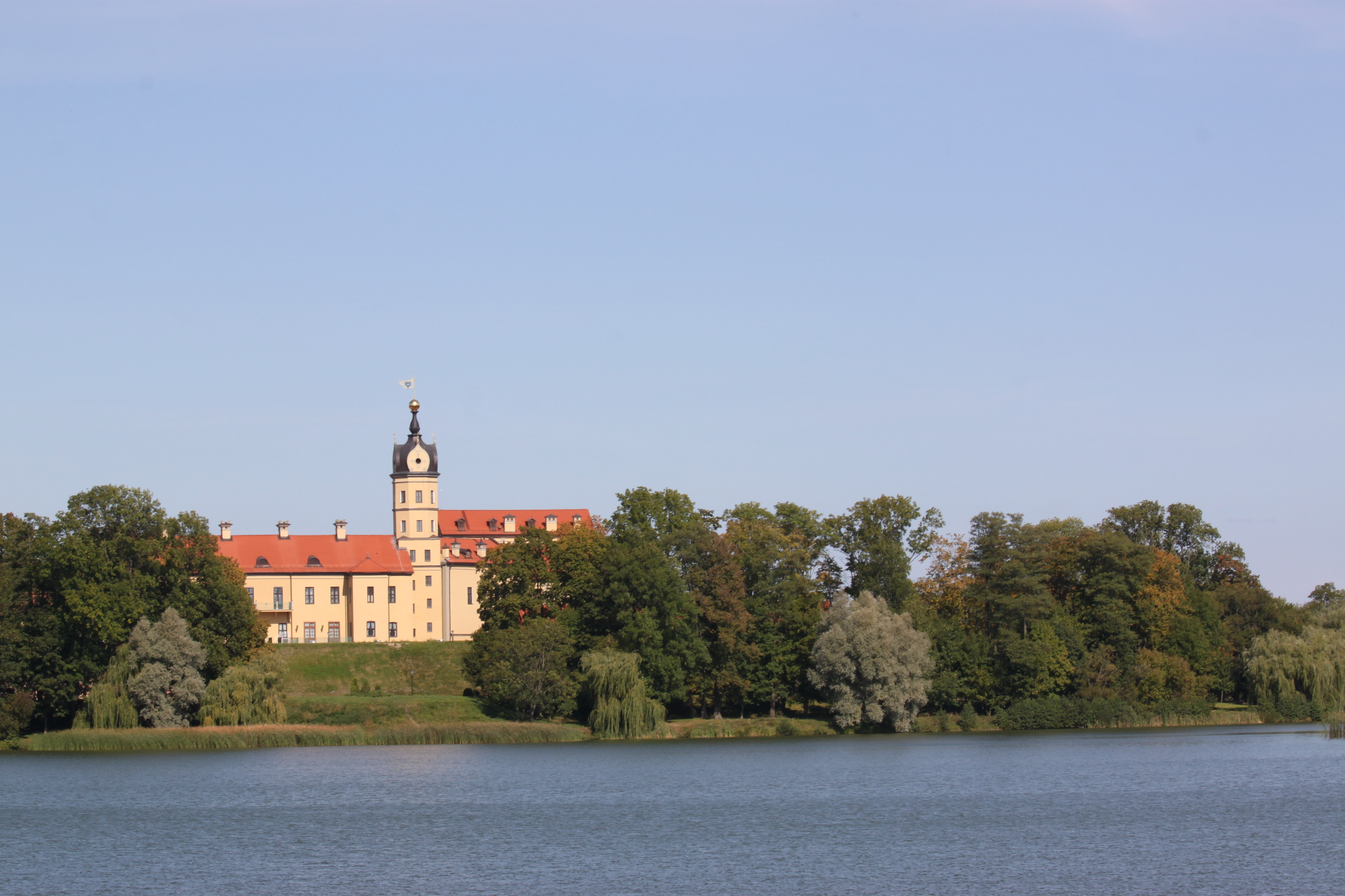 Беларуская (тарашкевіца): Нясвіжскі палацава-паркавы комплекс, 2011 год. Здымак з супрацьлеглага боку сажалкі